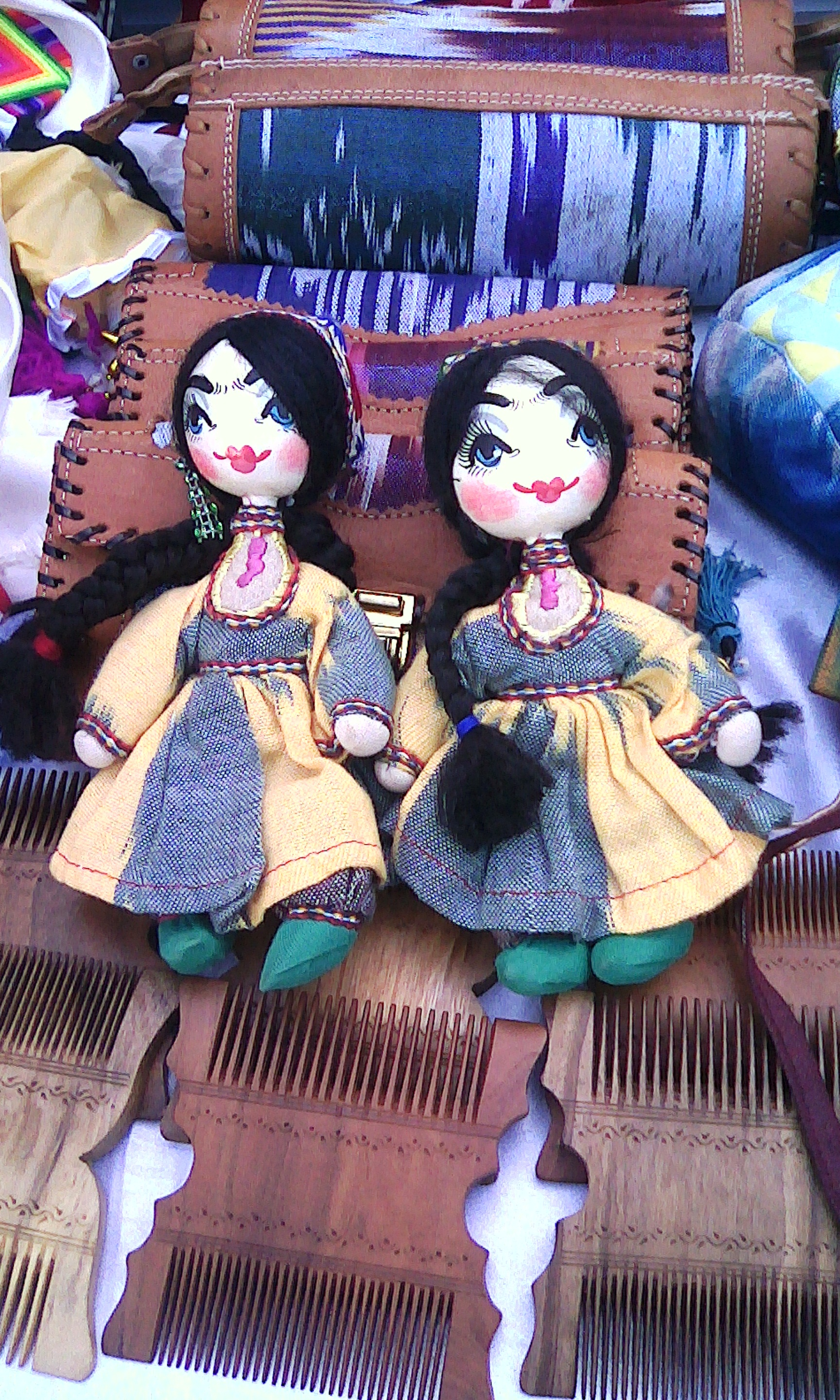 Тоҷикӣ: Зочаҳои кудакона, маҳсули дастдӯзии ҳунармандони халқӣ соли 2016 (Тоҷикистон)